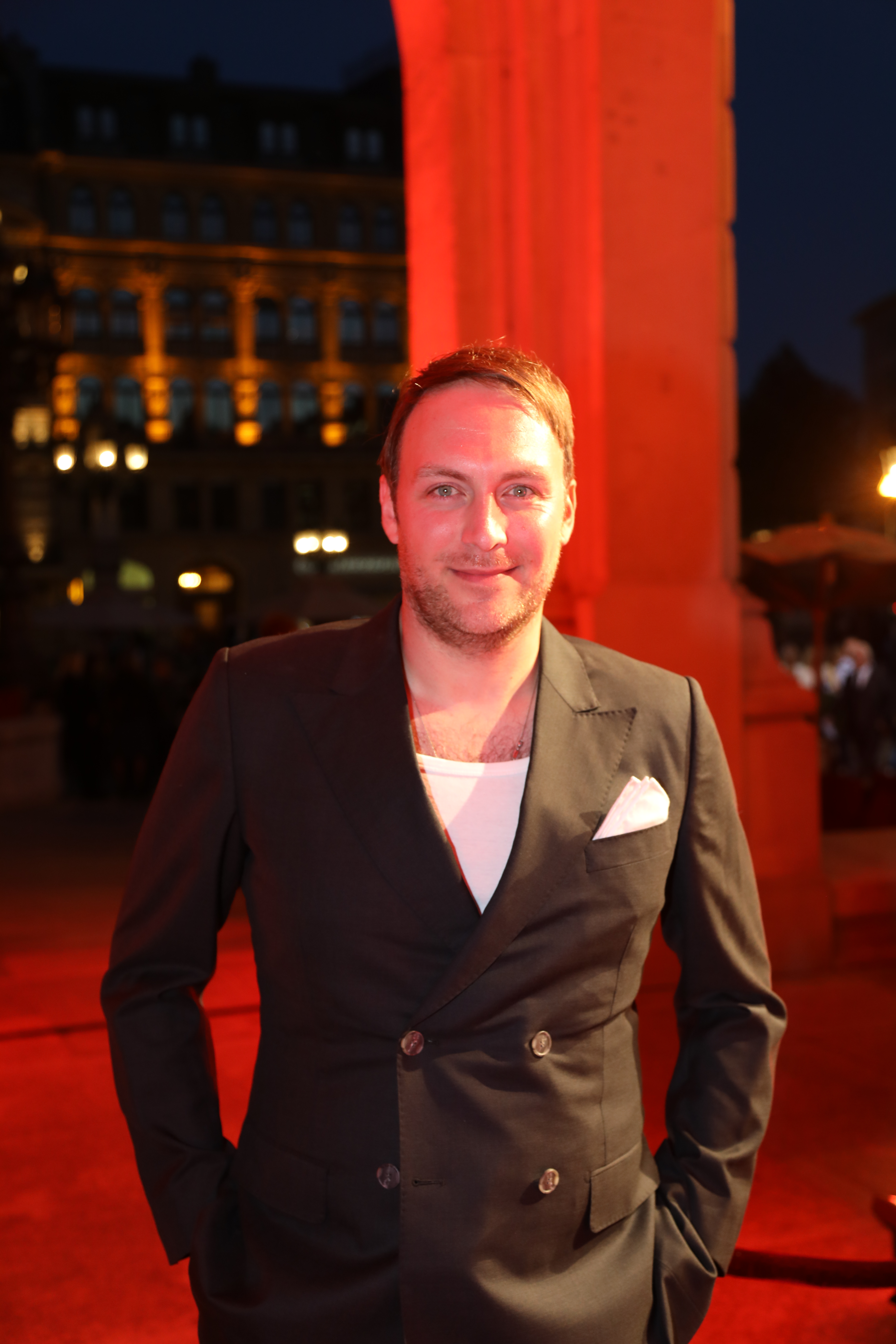 Martin Stange beim Hessischen Film- und Kinopreis 2018